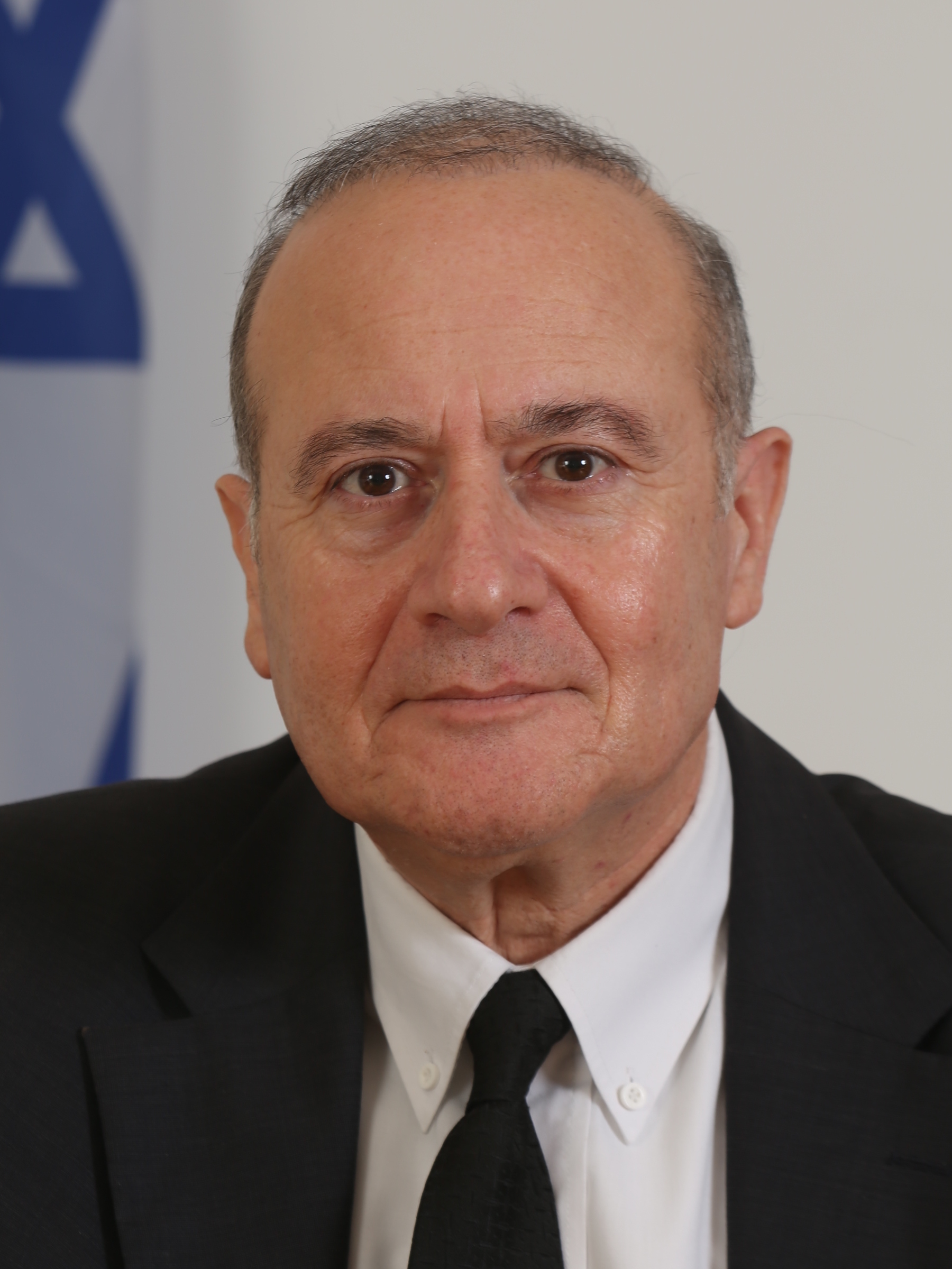 יוסף אלרון הוא נשיא בית המשפט המחוזי בחיפה. בפברואר 2017 נבחר לשמש שופט בבית המשפט העליון.